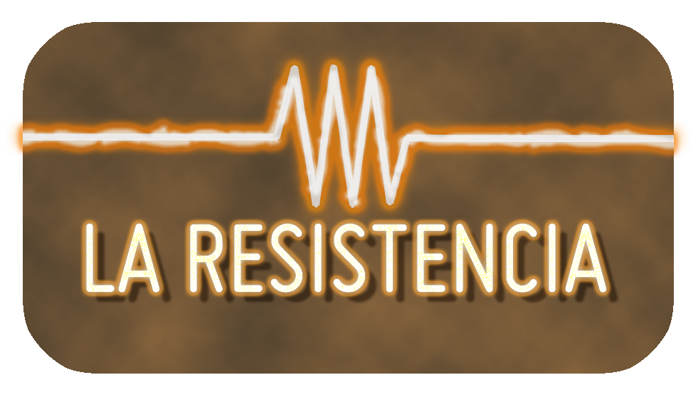 Logo similar al original con formas simples y fuente Miso OT1 y fondo hecho con filtros de photoshop